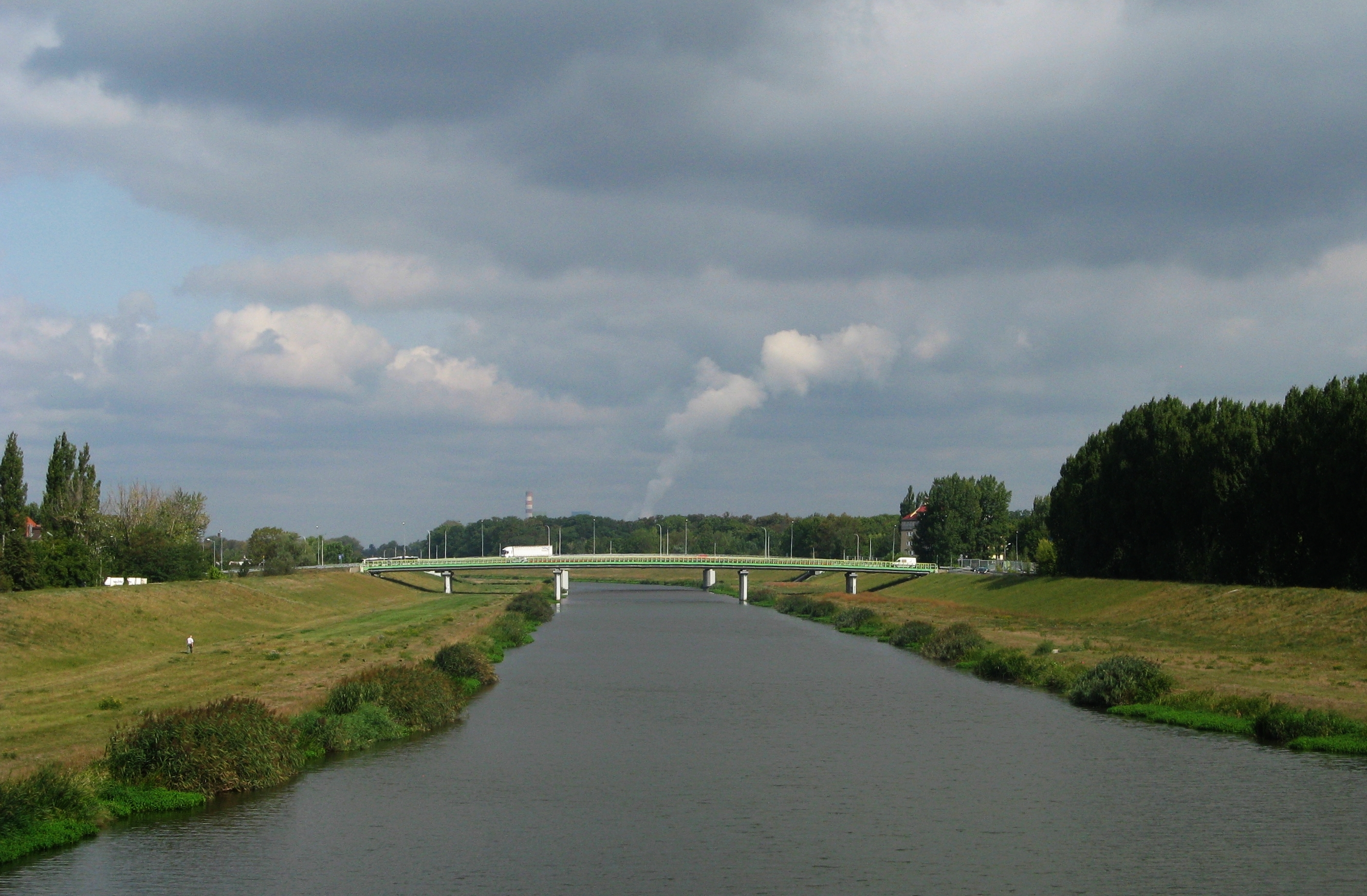 Most Zaodrzański w Opolu w ciągu ulicy Spychalskiego nad Kanałem Ulgi, w tle Elektrownia Opole; widok z okna pociągu